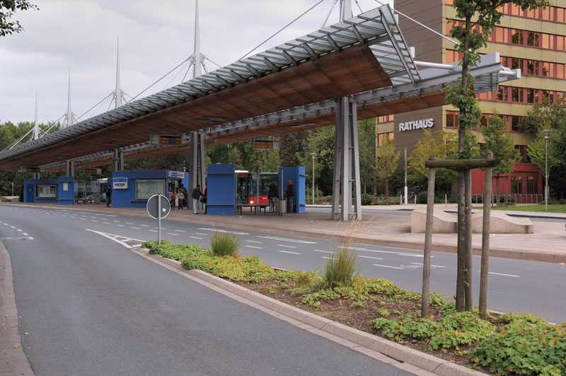 Germany Bergkamen Busbahnhof